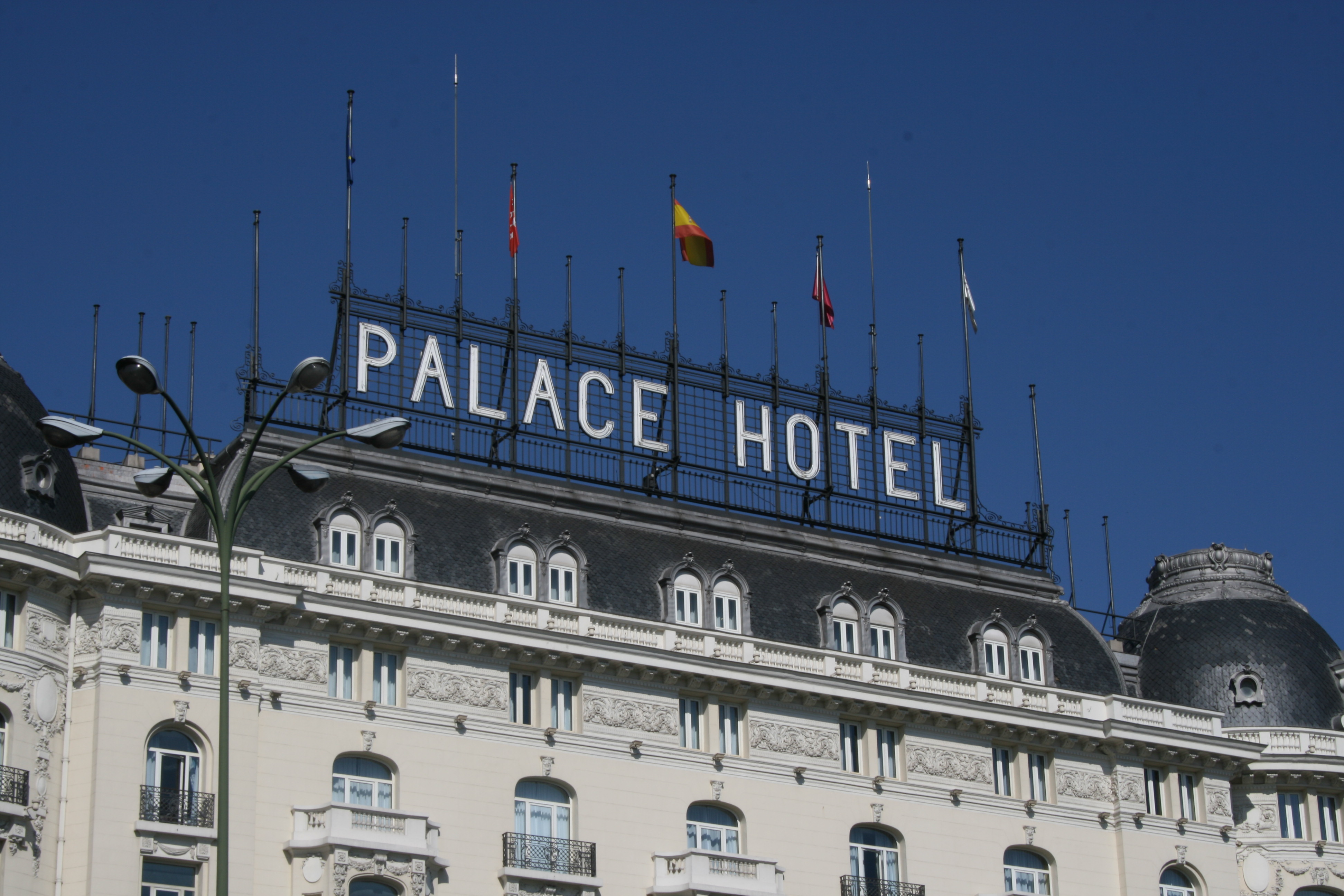 Cartel de Neón - Hotel Palace - Madrid